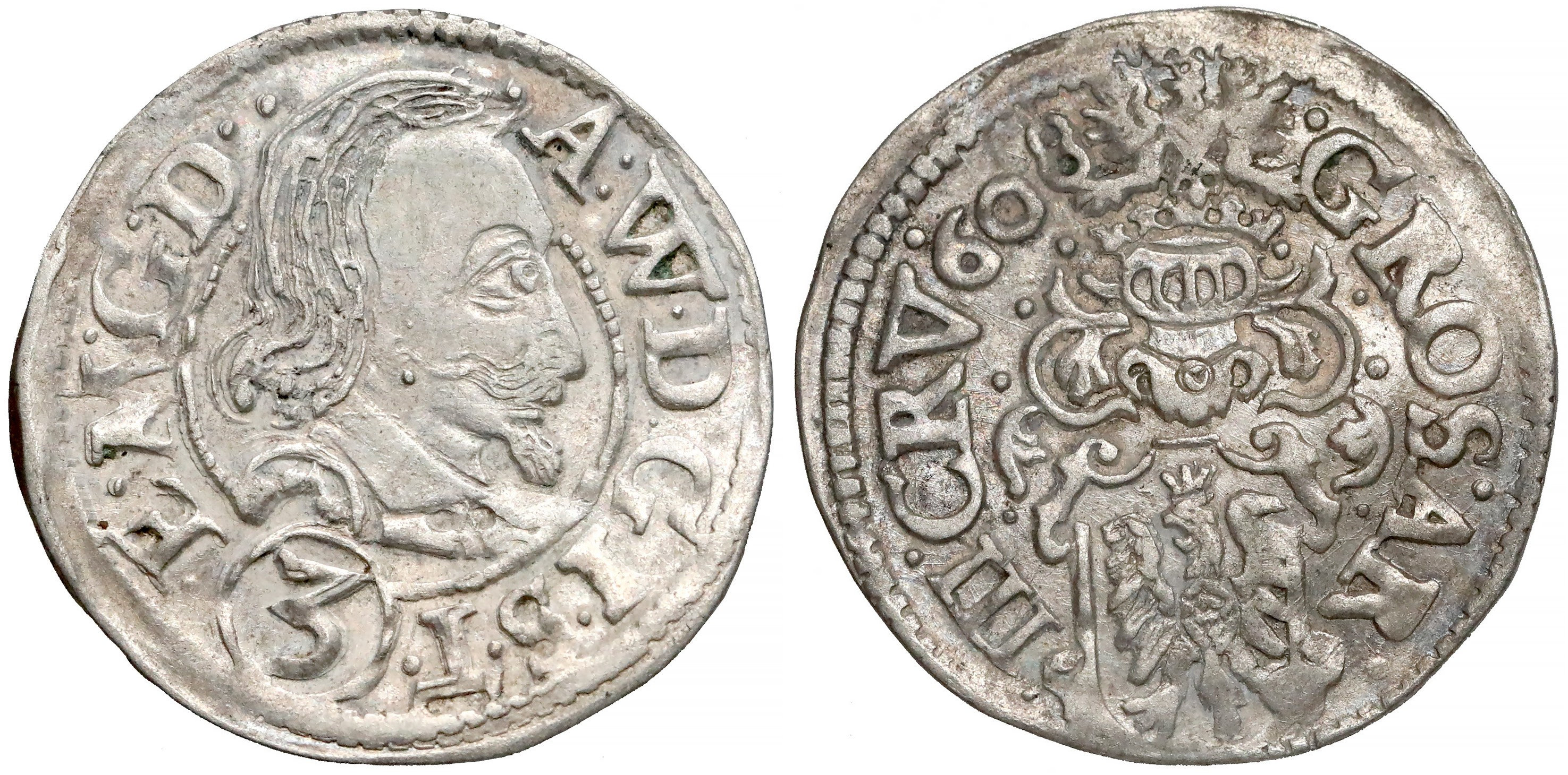 3 krajcary Cieszyn 1608